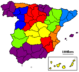 Modificación del mapa "Map_Spain_1822_.png" en la antigua provincia de Vilafranca del Bierzo a sus correctos límites